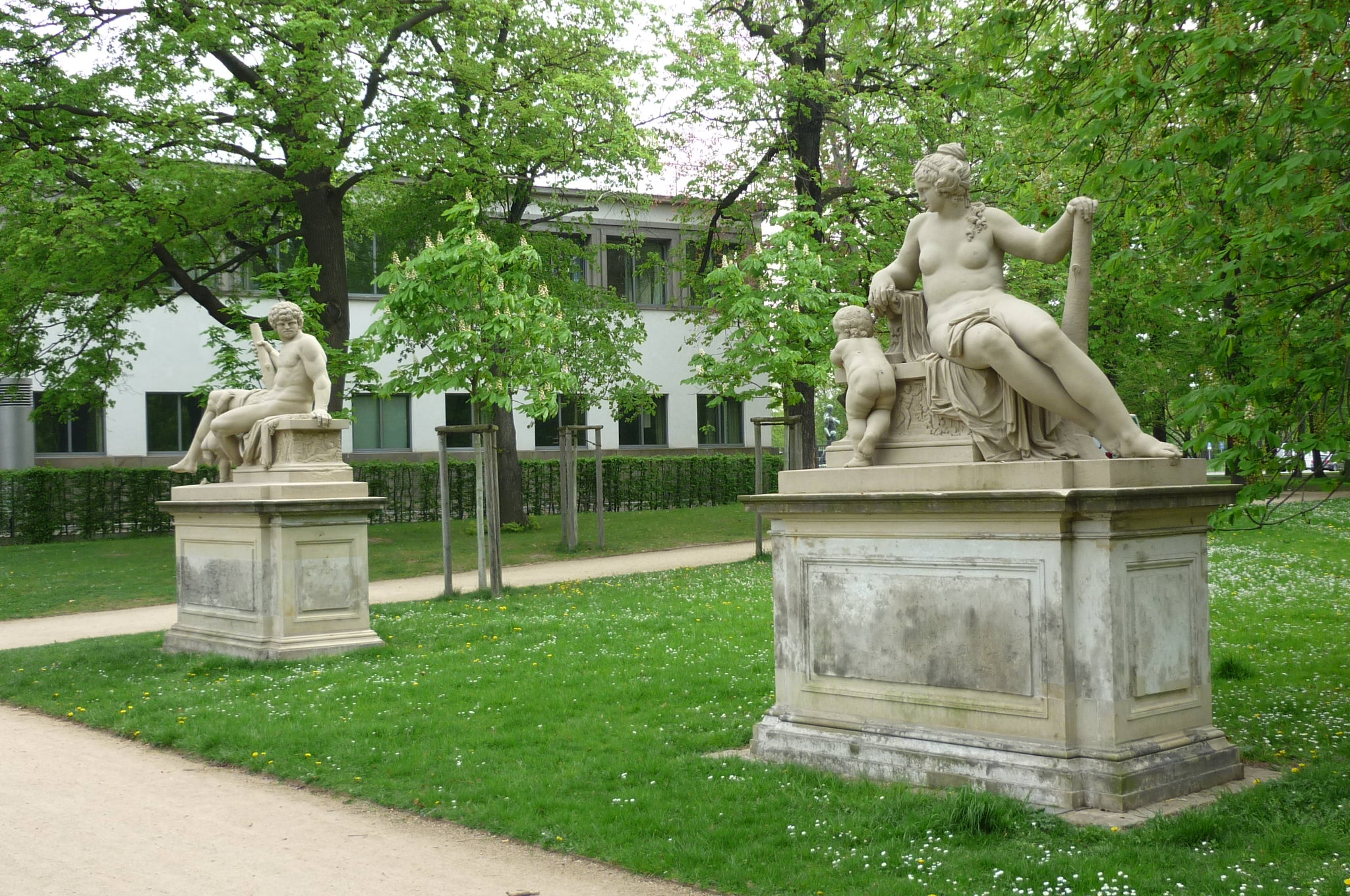 Denkmäler Herkules und Megara im Blüherpark Dresden